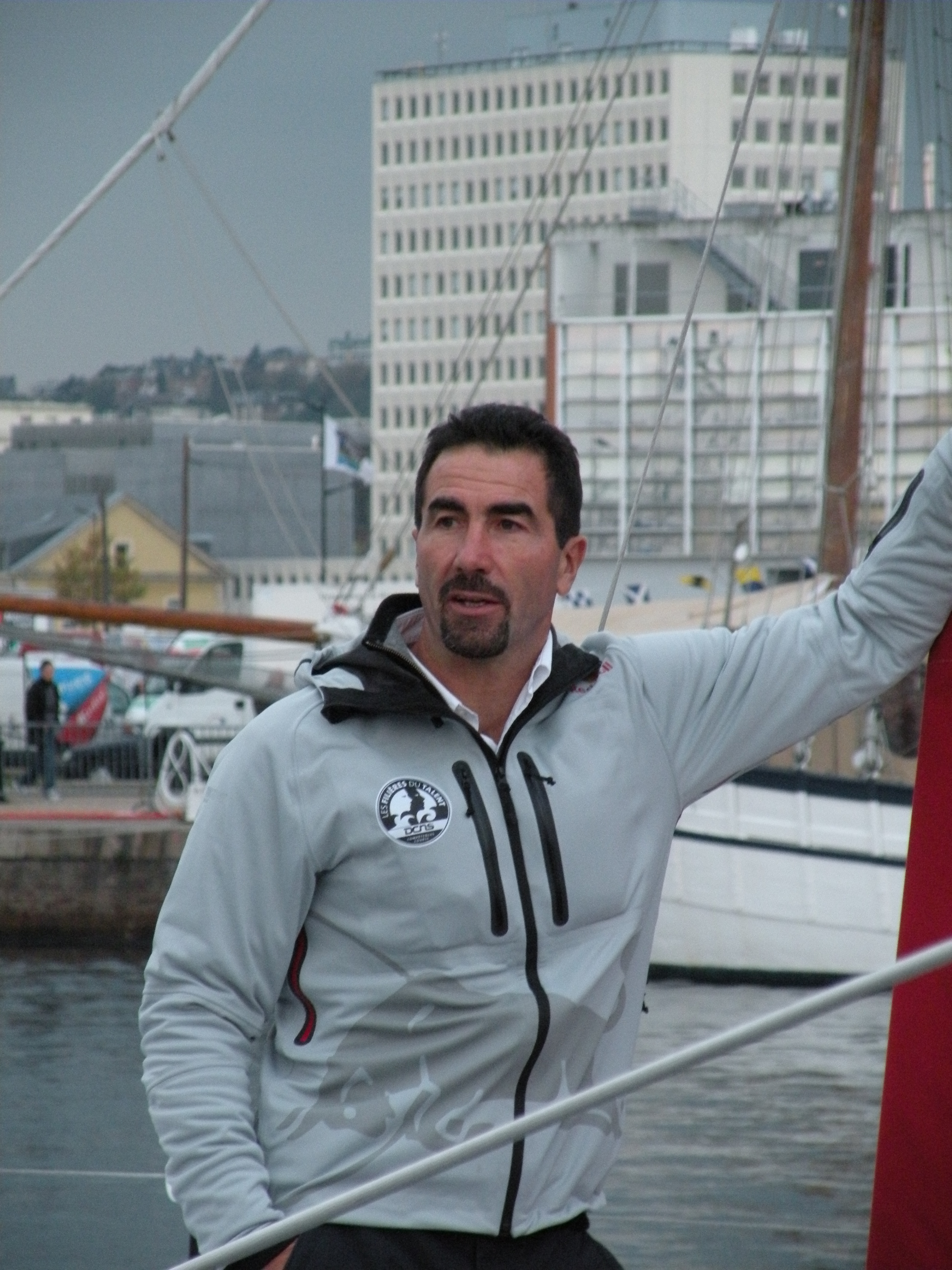 Le co-skipper de DCNS 1000, Luc Alphand, au Havre lors de la Transat Jacques Vabre 2011.